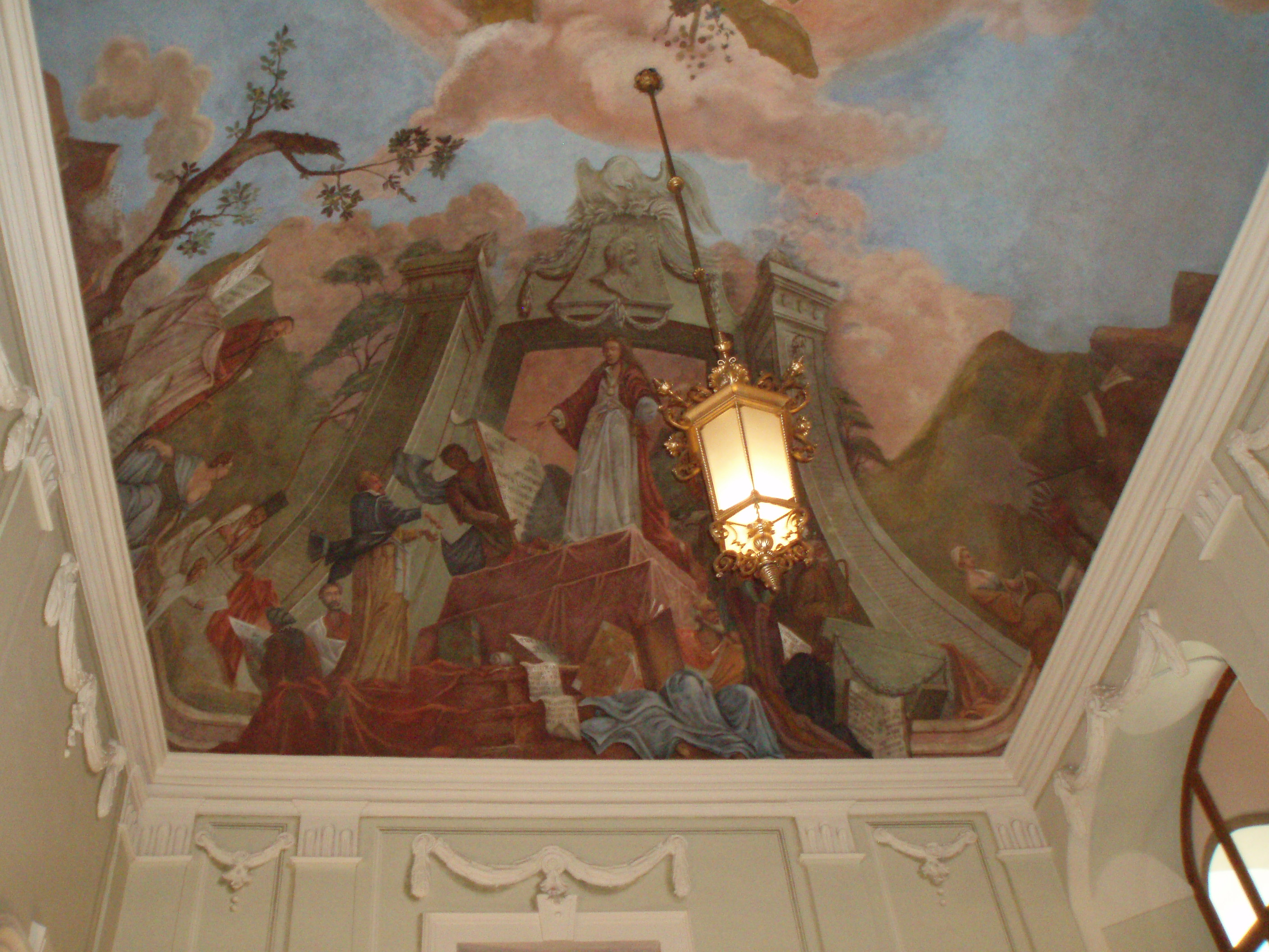 schodisko radnice Kosice